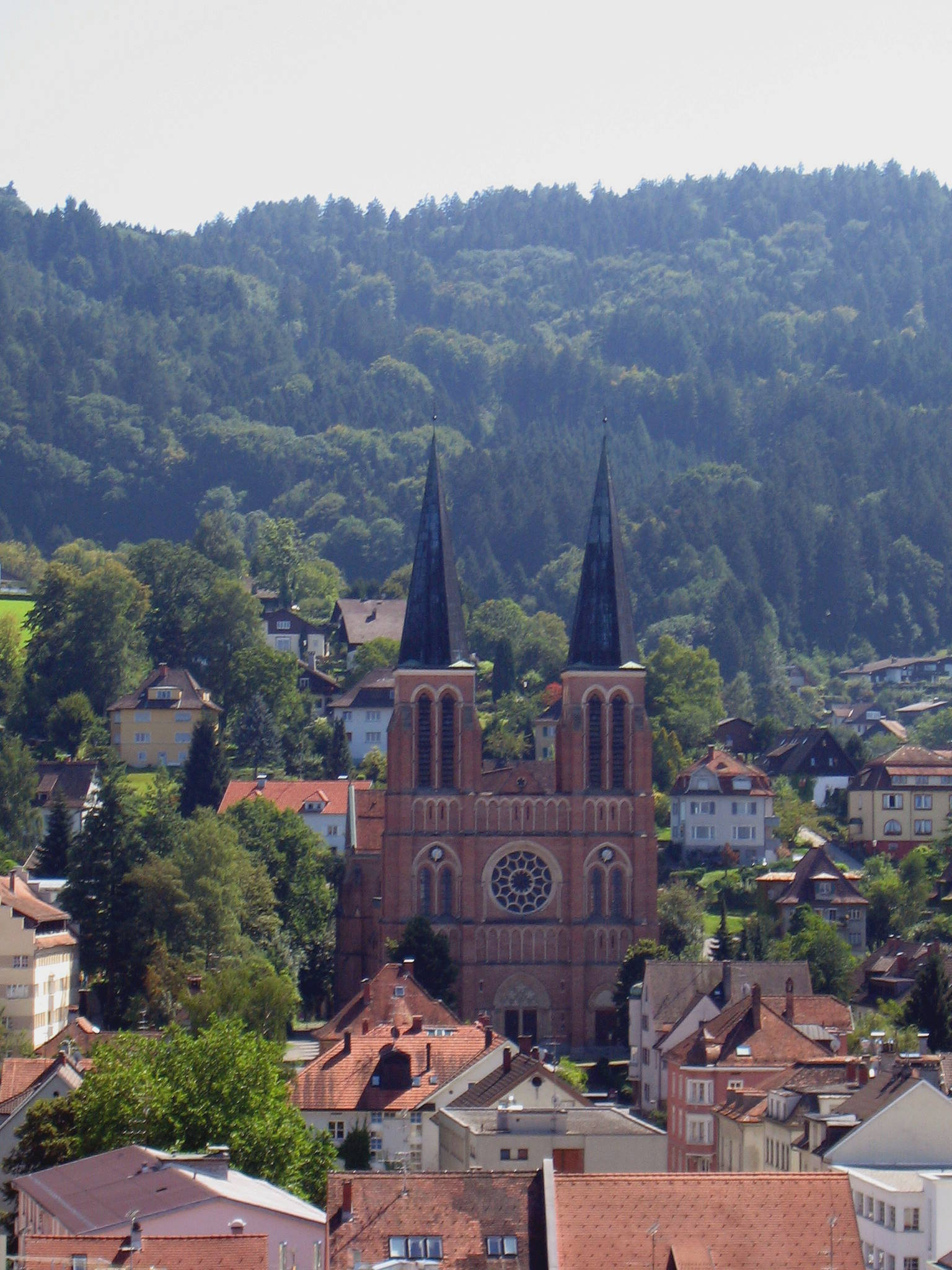 Description: Außenansicht der Herz-Jesu-Kirche in Bregenz Source: own work Date: 28.08.2004 Author: Florian Glöcklhofer